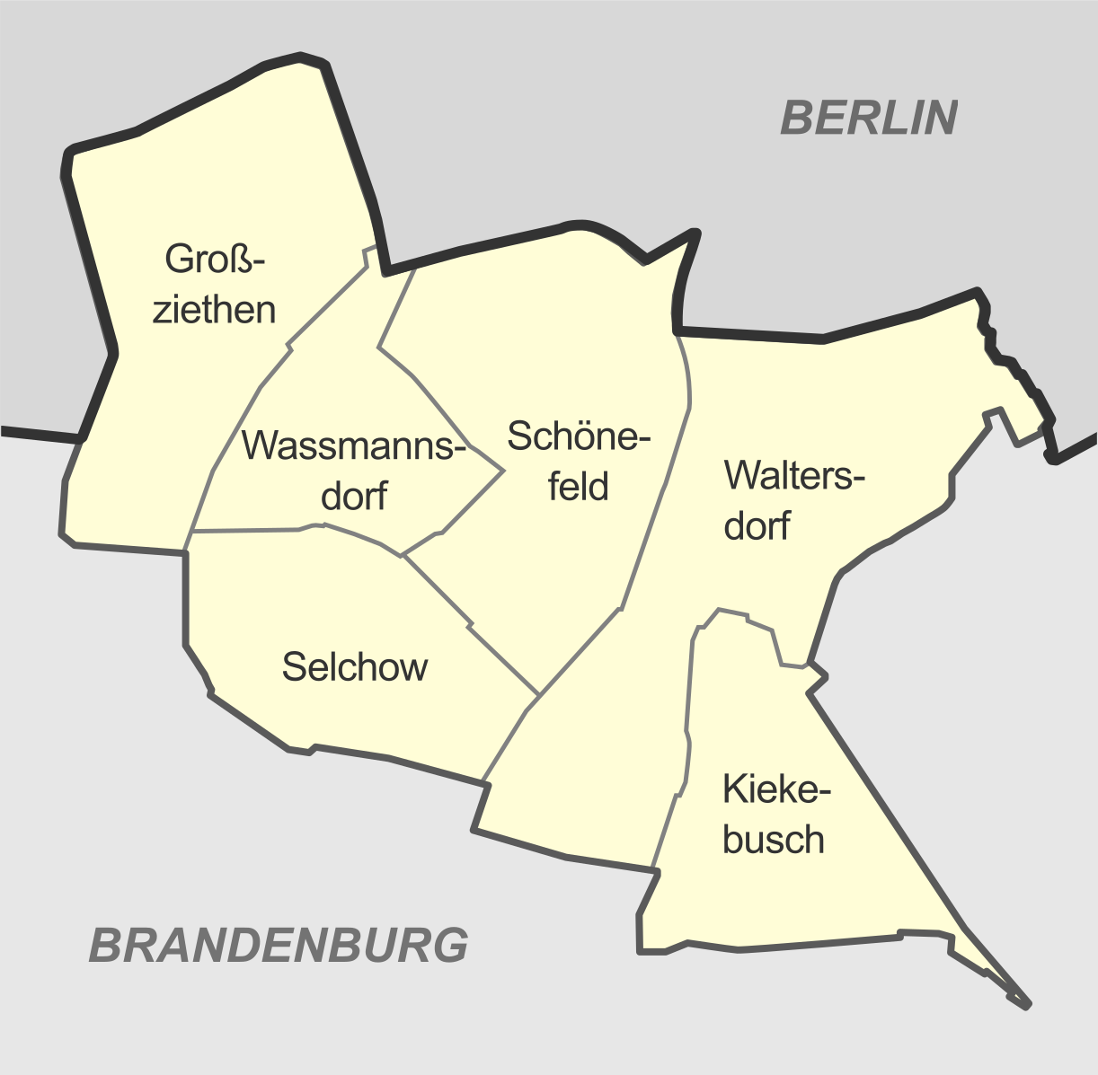 Gliederung der Gemeine Schönefeld in Ortsteile